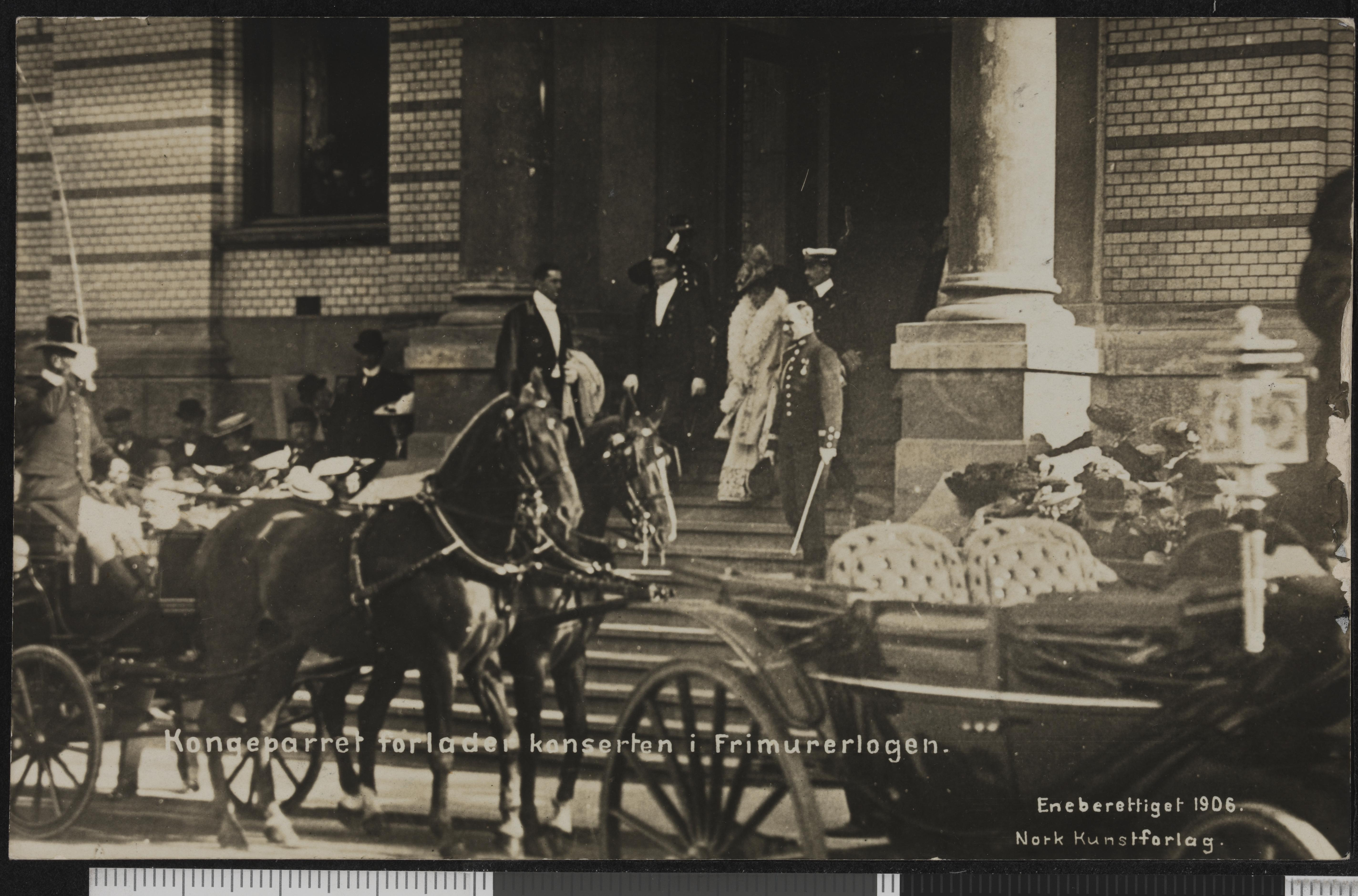 Bildet er hentet fra Nasjonalbibliotekets bildesamling Frimurerlosjen, Trondheim, Sør-Trøndelag